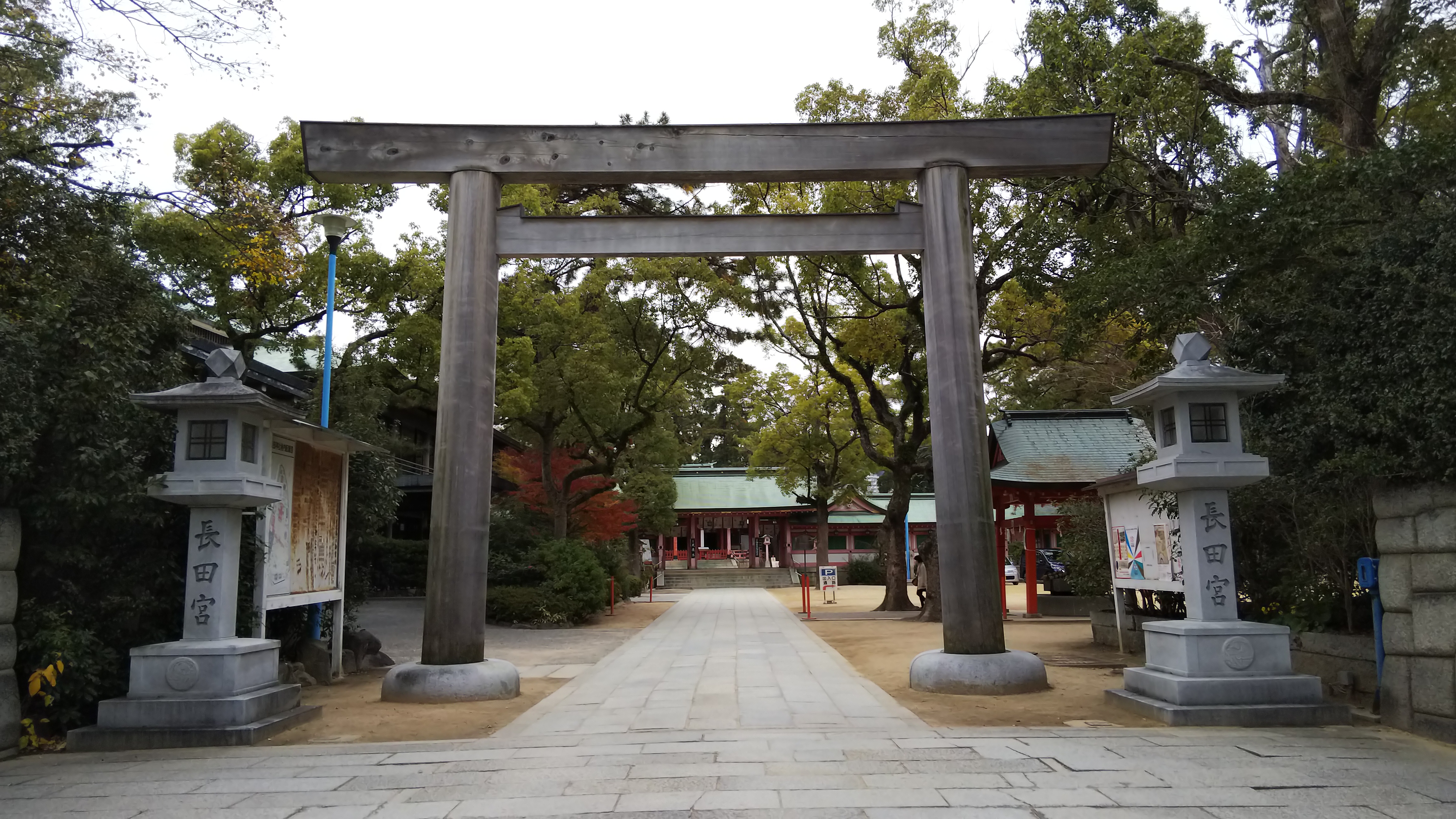 長田神社鳥居